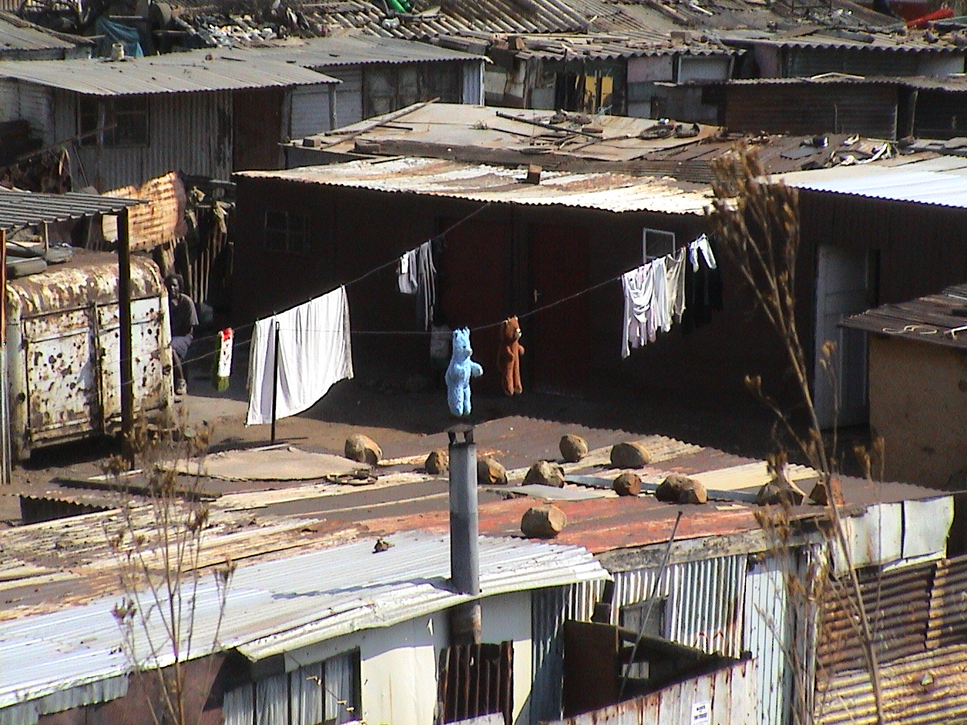 Soweto